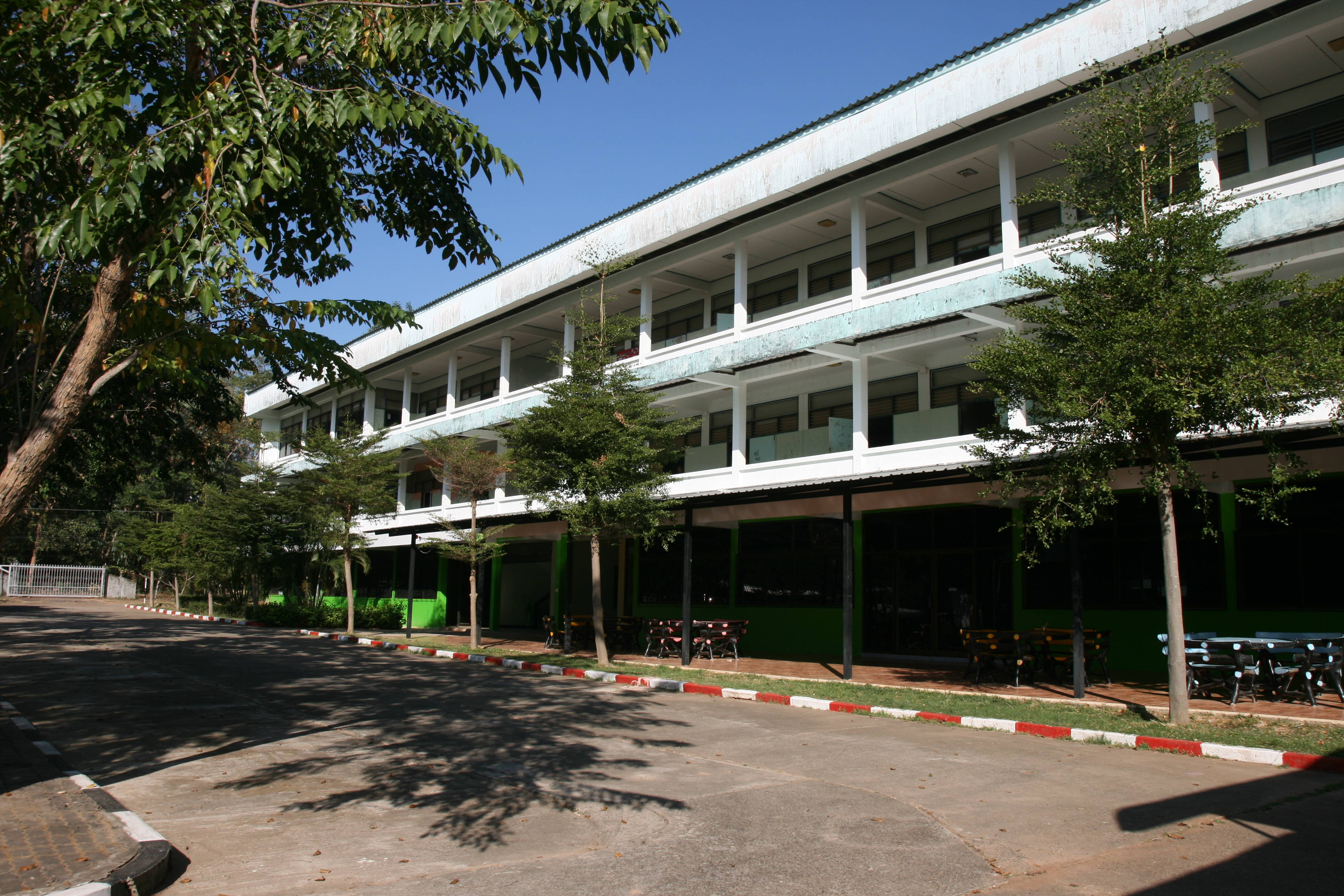 อาคาร 2 โรงเรียนตาลสุมพัฒนา